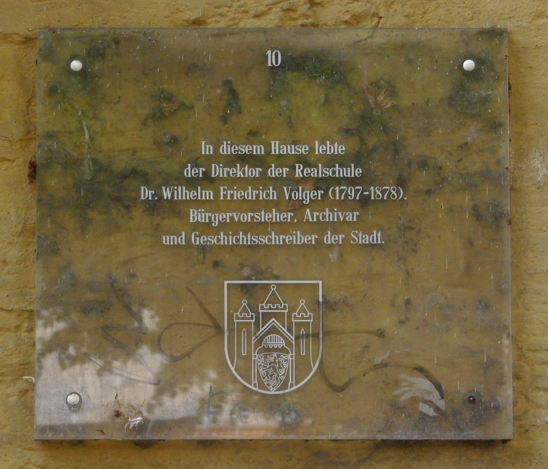 Lüneburg, Papenstraße 6, Gedenktafel für Wilhelm Friedrich Volger (Wohnhaus)